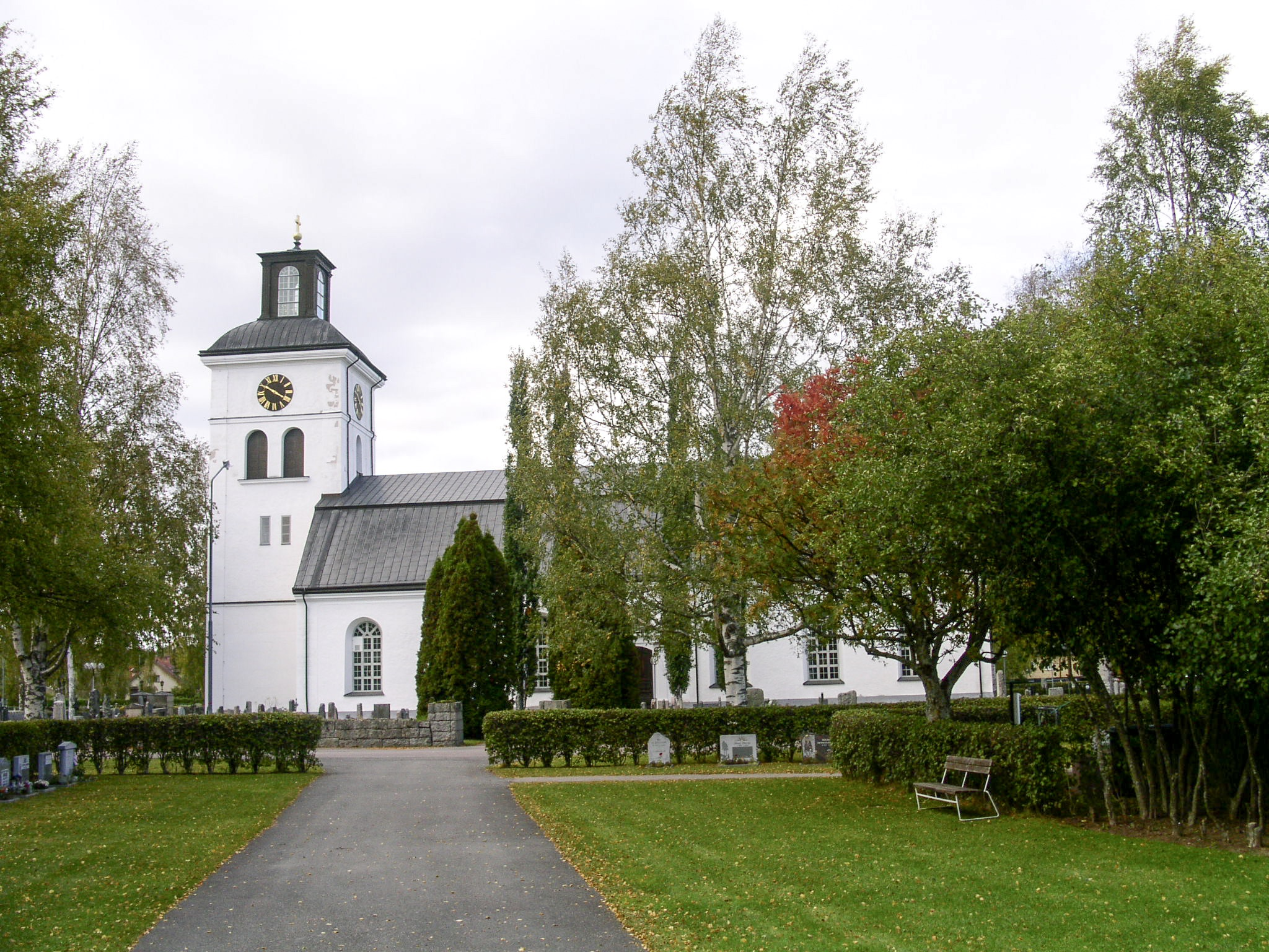 Järna church, Dalarna